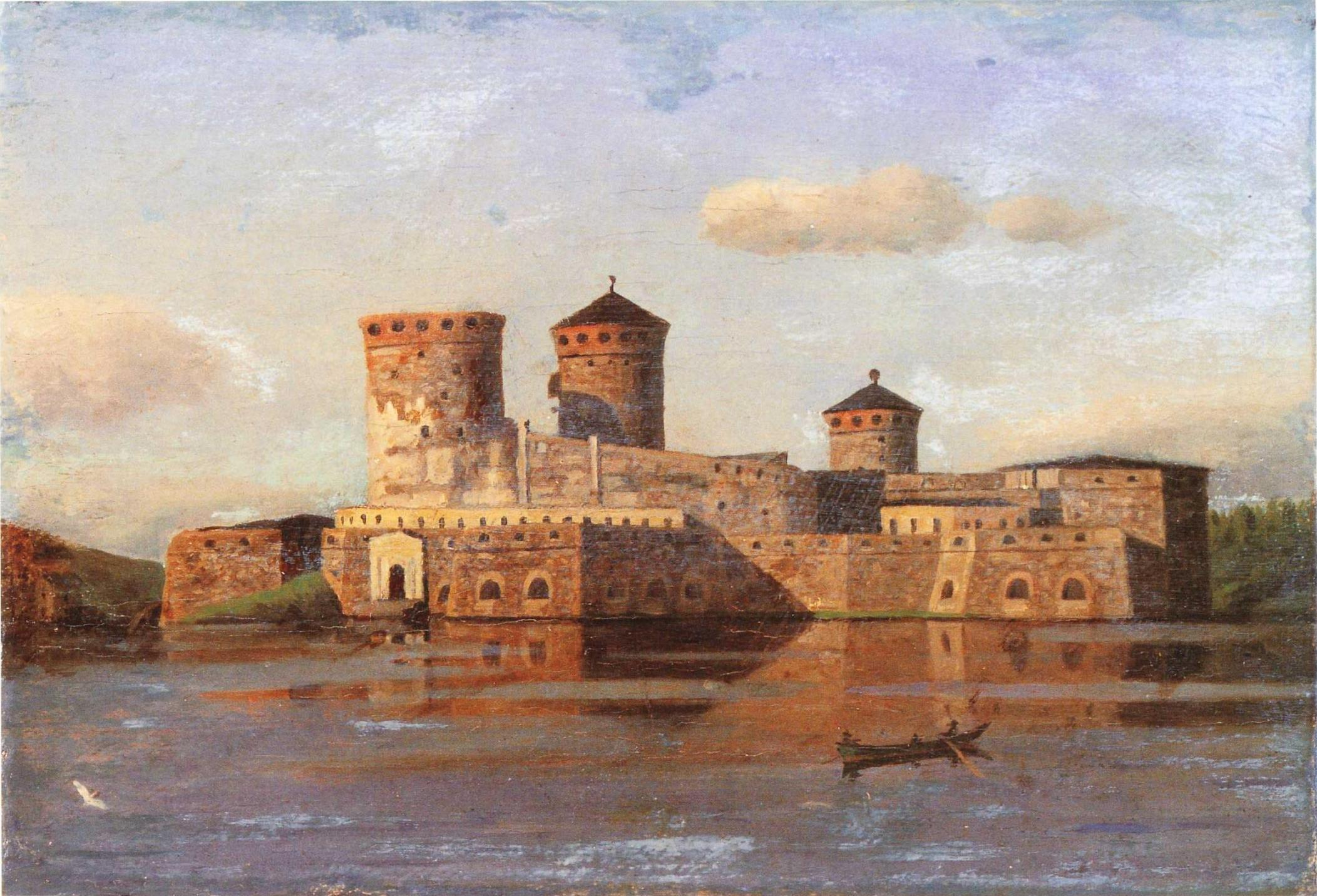 Oscar Kleinehin maalaus Olavinlinnasta ennen 1870-luvun restaurointia. Kuuluu Taidesäätiö Meritan kokoelmiin.